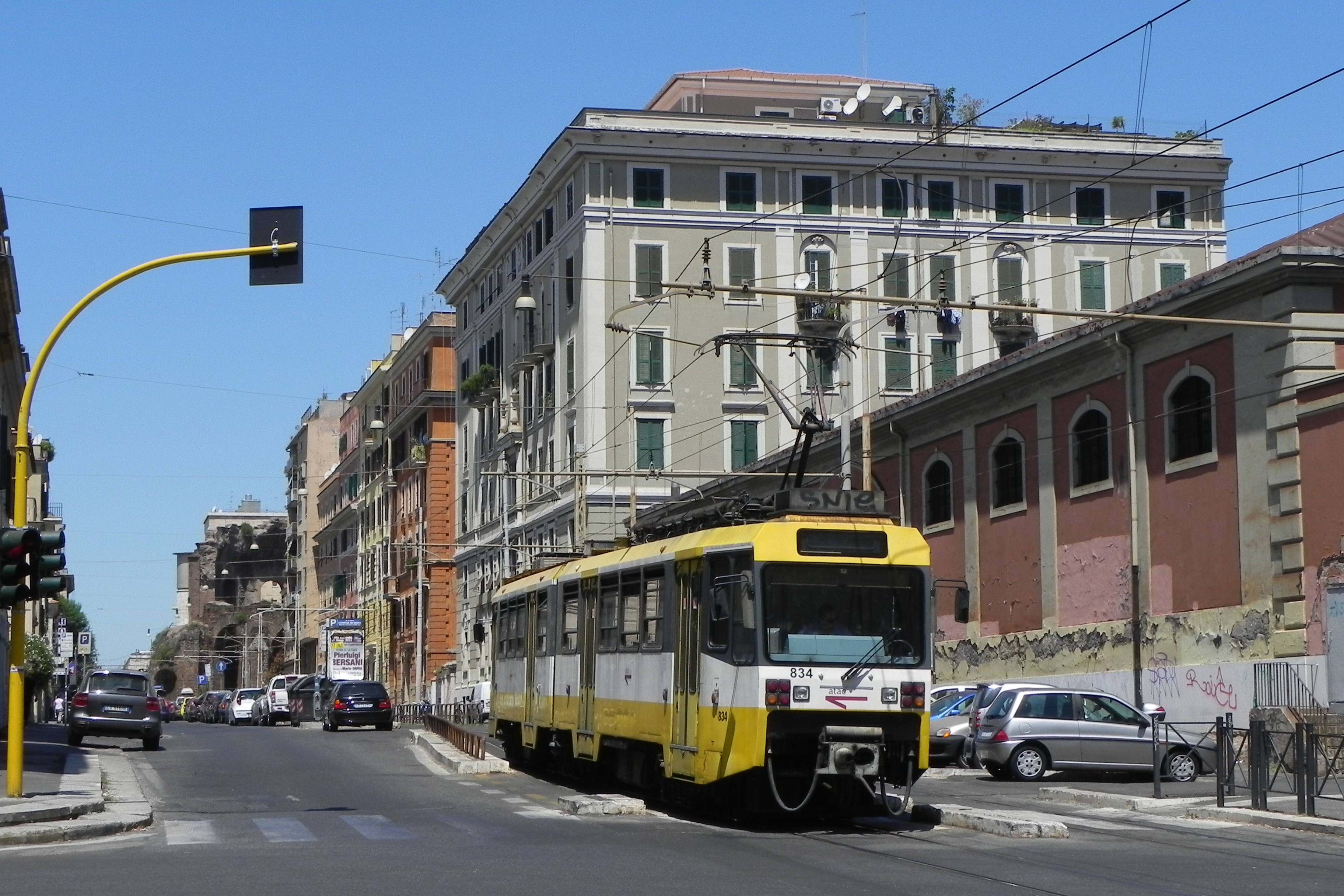 Elettromotrice articolata T66, costruita dalla Firema nel 1999, ATAC n. 834 (dal 2010), a Roma in via Giolitti / p.le Labicano.